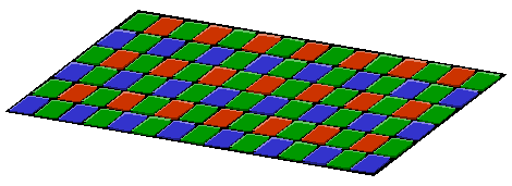 Filtro de Bayer utilizado en numerosas cámaras digitales. Color cells layout of a Bayer filter for CCD sensor Personal drawing